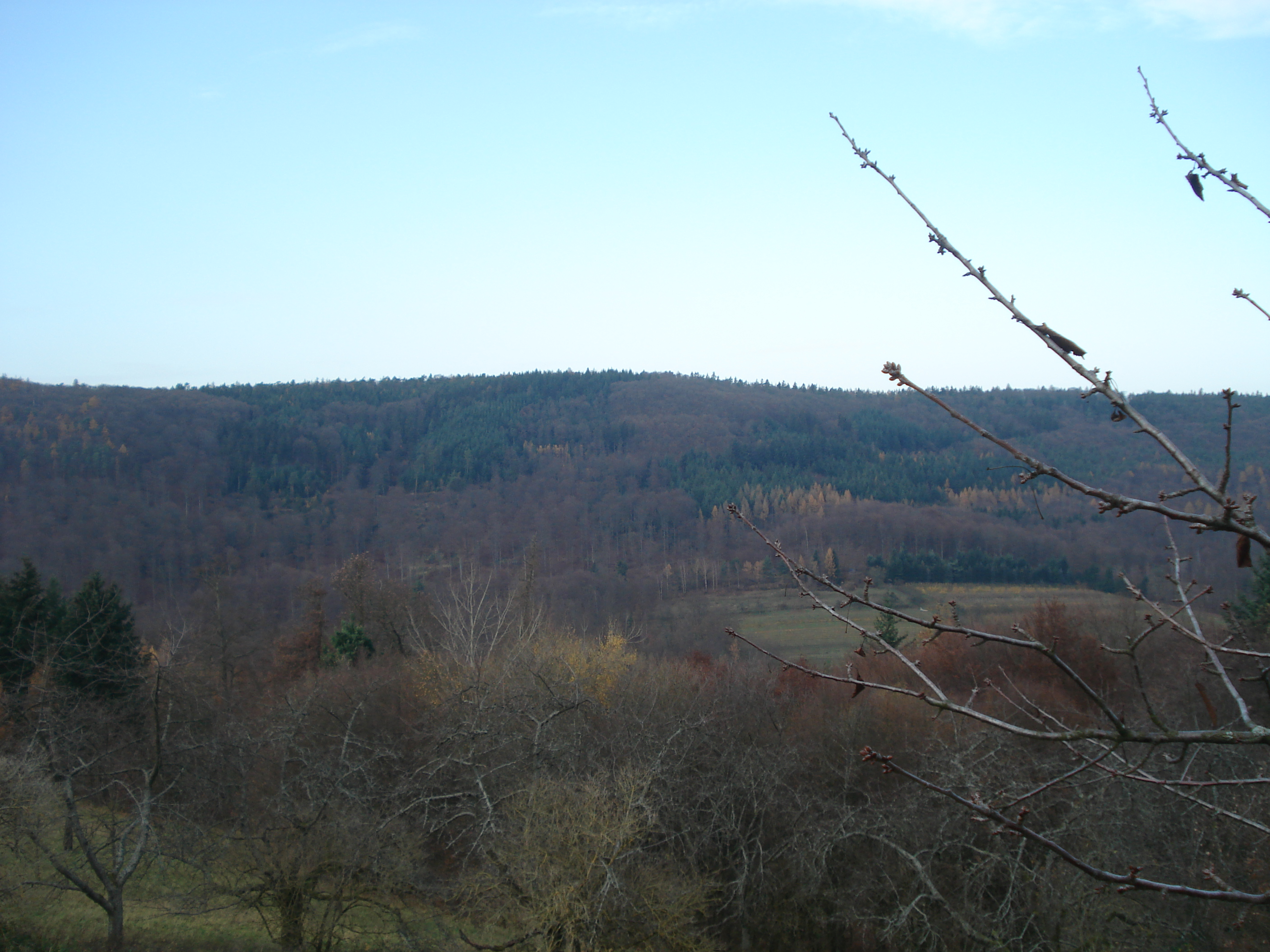 Der Heidkopf zwischen Alzenau-Albstadt und Mömbris